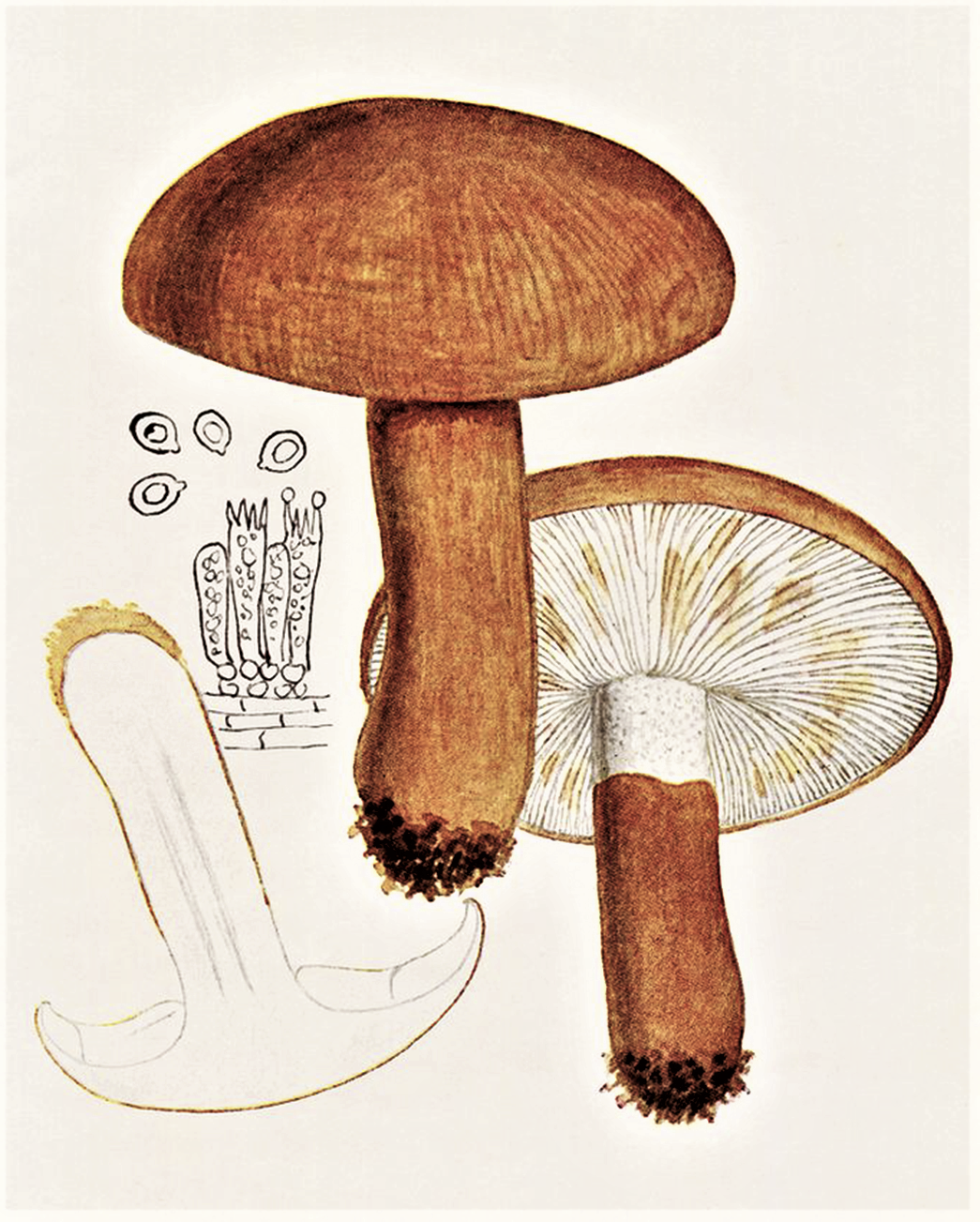 Bres.: Tricholoma subannulatum (Batsch, 1786) Bres. (1927), heute Tricholoma batschii (Gulden, 1969) Noordel. & Mort.Chr. (1999)